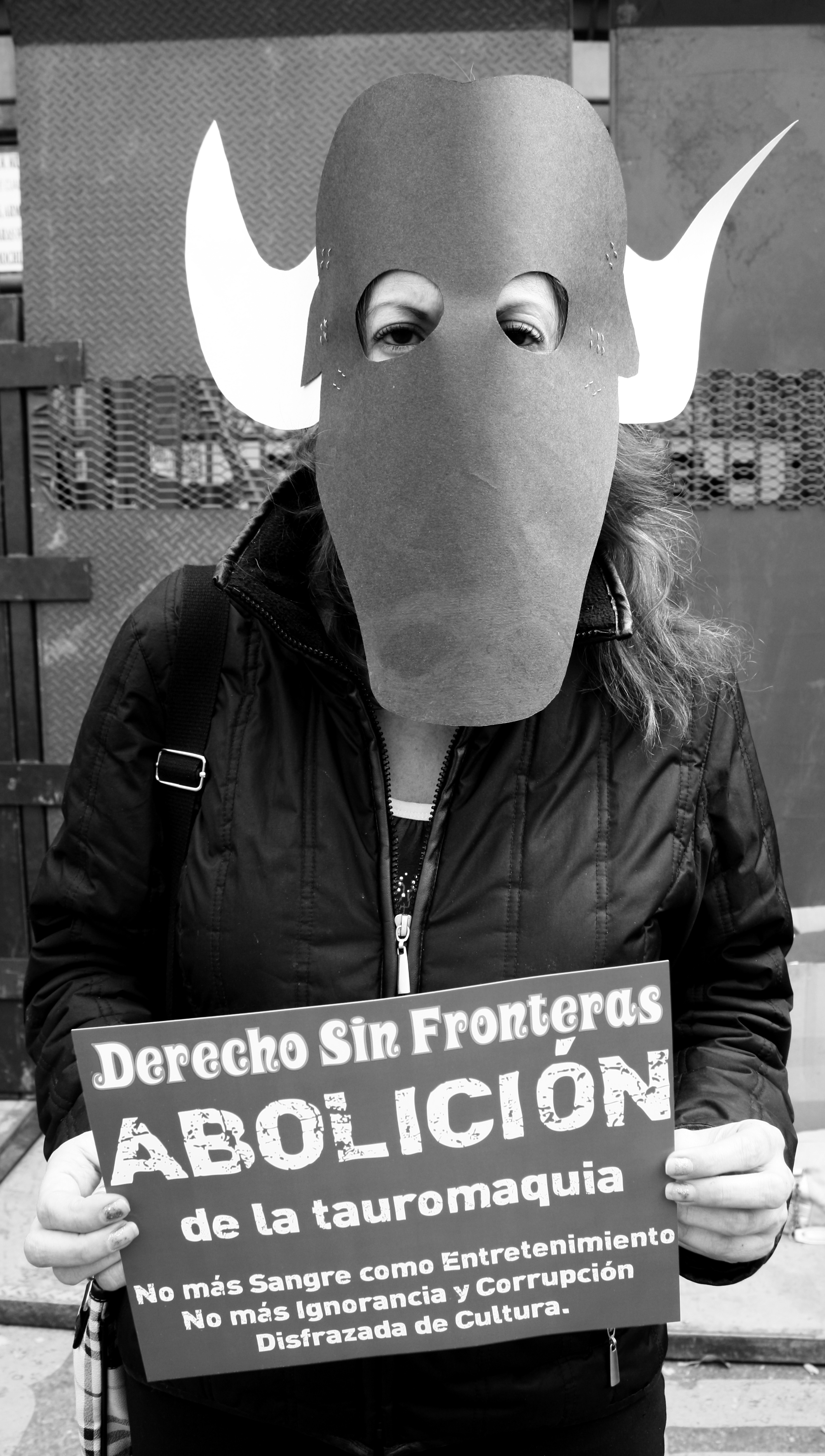 Movimiento por la abolición de la tauromaquia al pie de la entrada principal de la Plaza de Toros México.